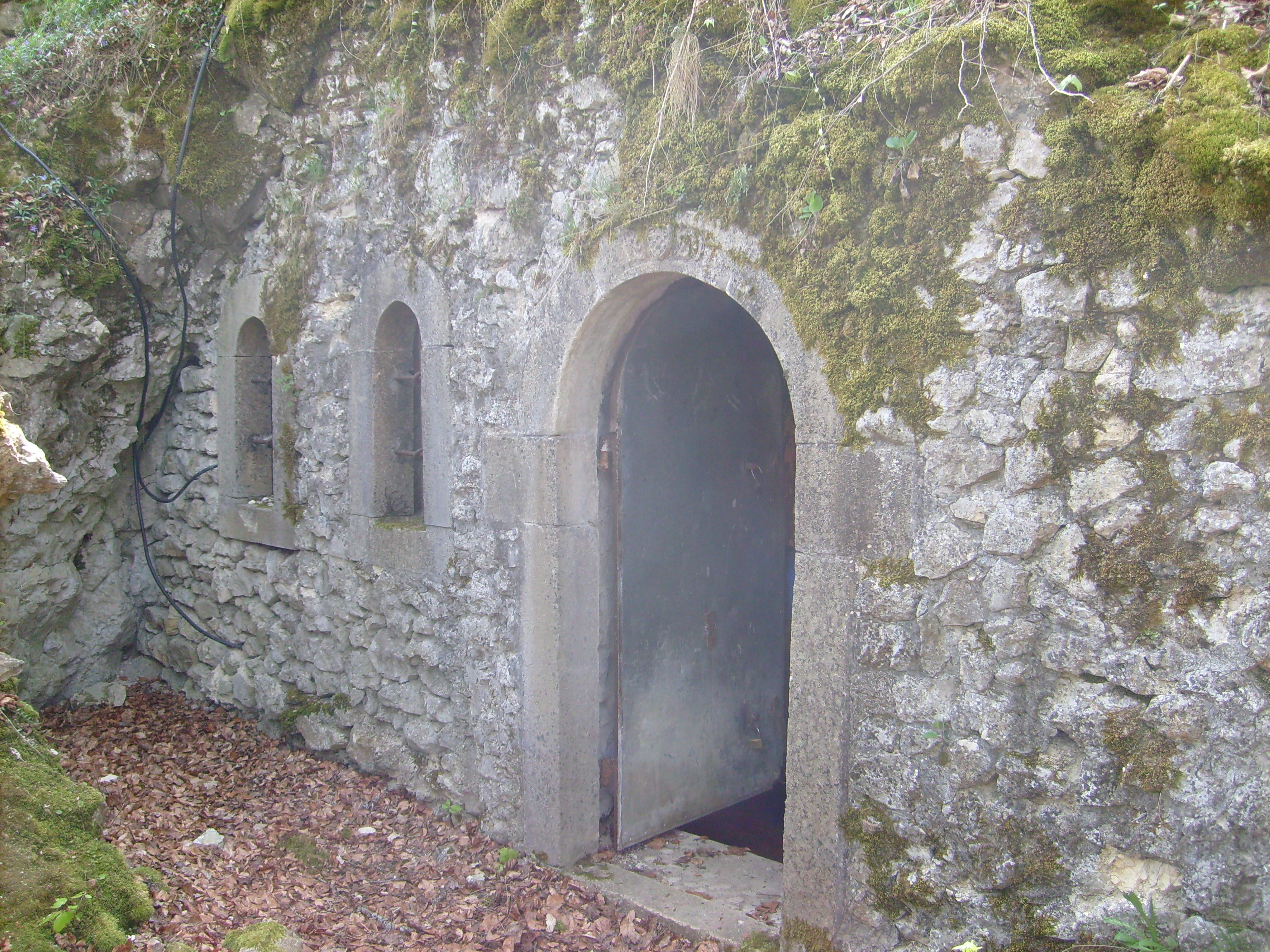 Vermauerter Eingang der Burghöhle Dietfurt. Mauer wurde durch den Neutempler-Orden erreichtet.